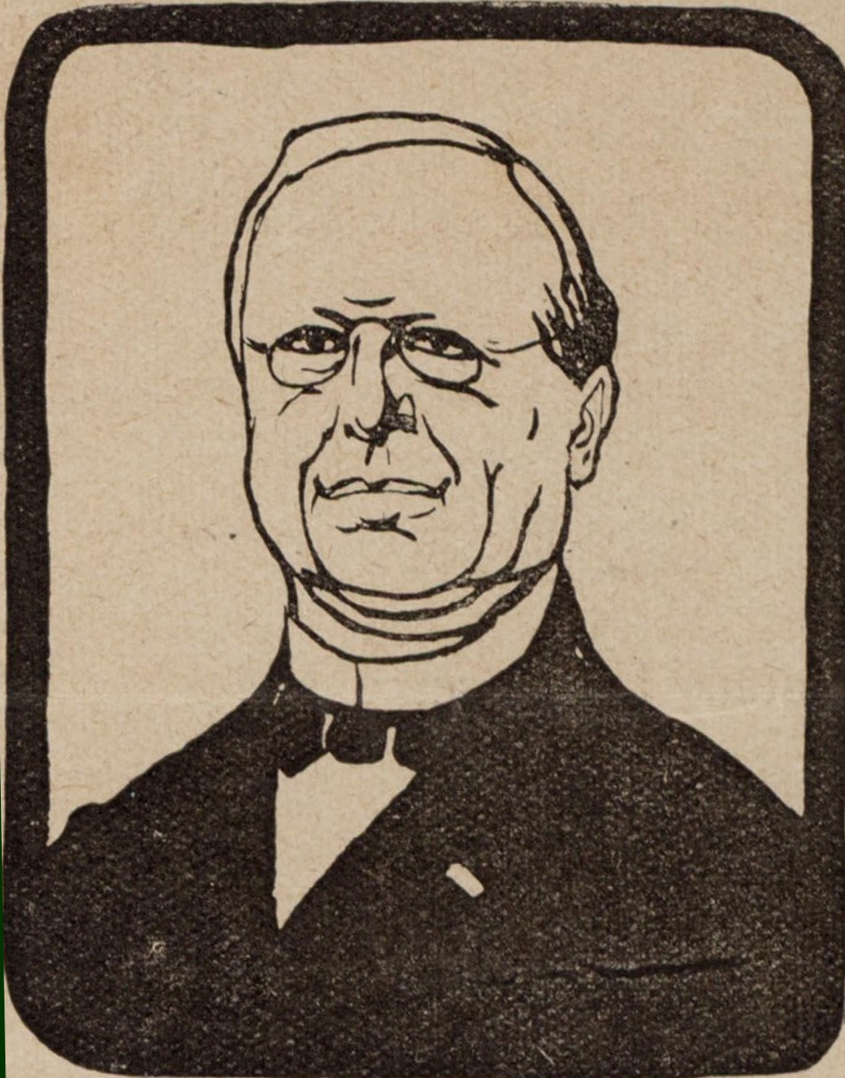 Johannes Theodoor de Visser Tekenaar: Hahn, Albert uitgever: De Notenkraker